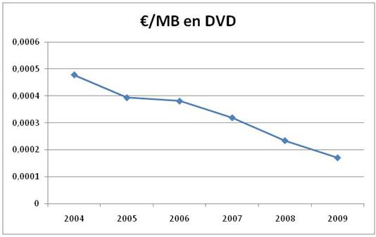 Evolución del coste por Megabyte del DVD